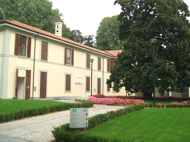 Villa Candiani-Magatti, Lissone